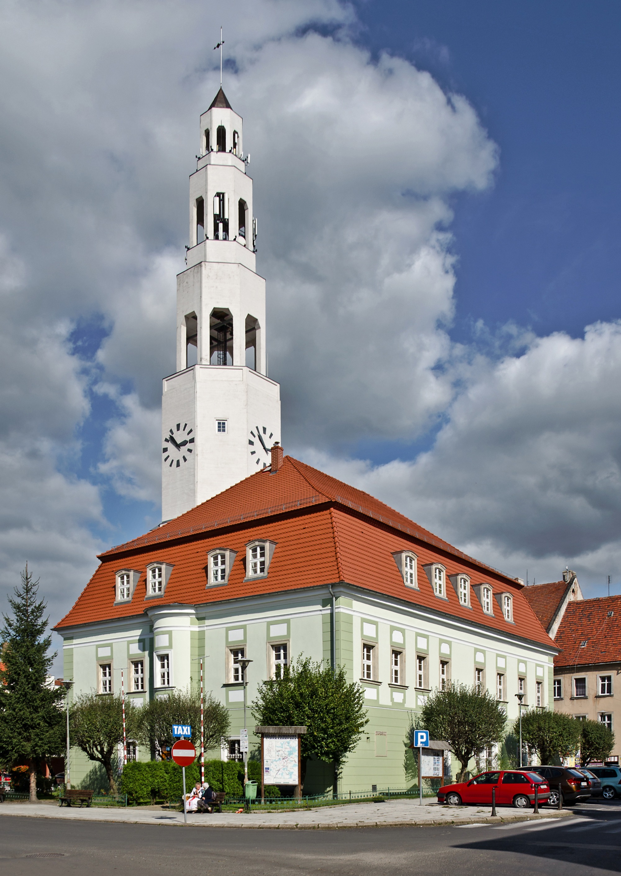 Rathaus am Ring in Greiffenberg